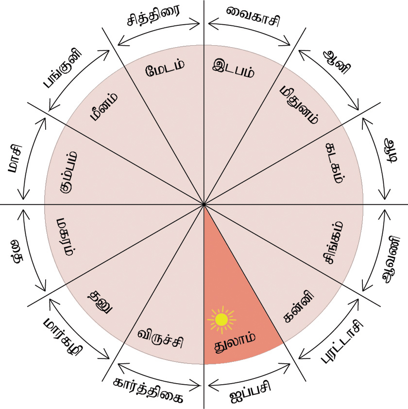 Drawn by the user who uploaded it here.